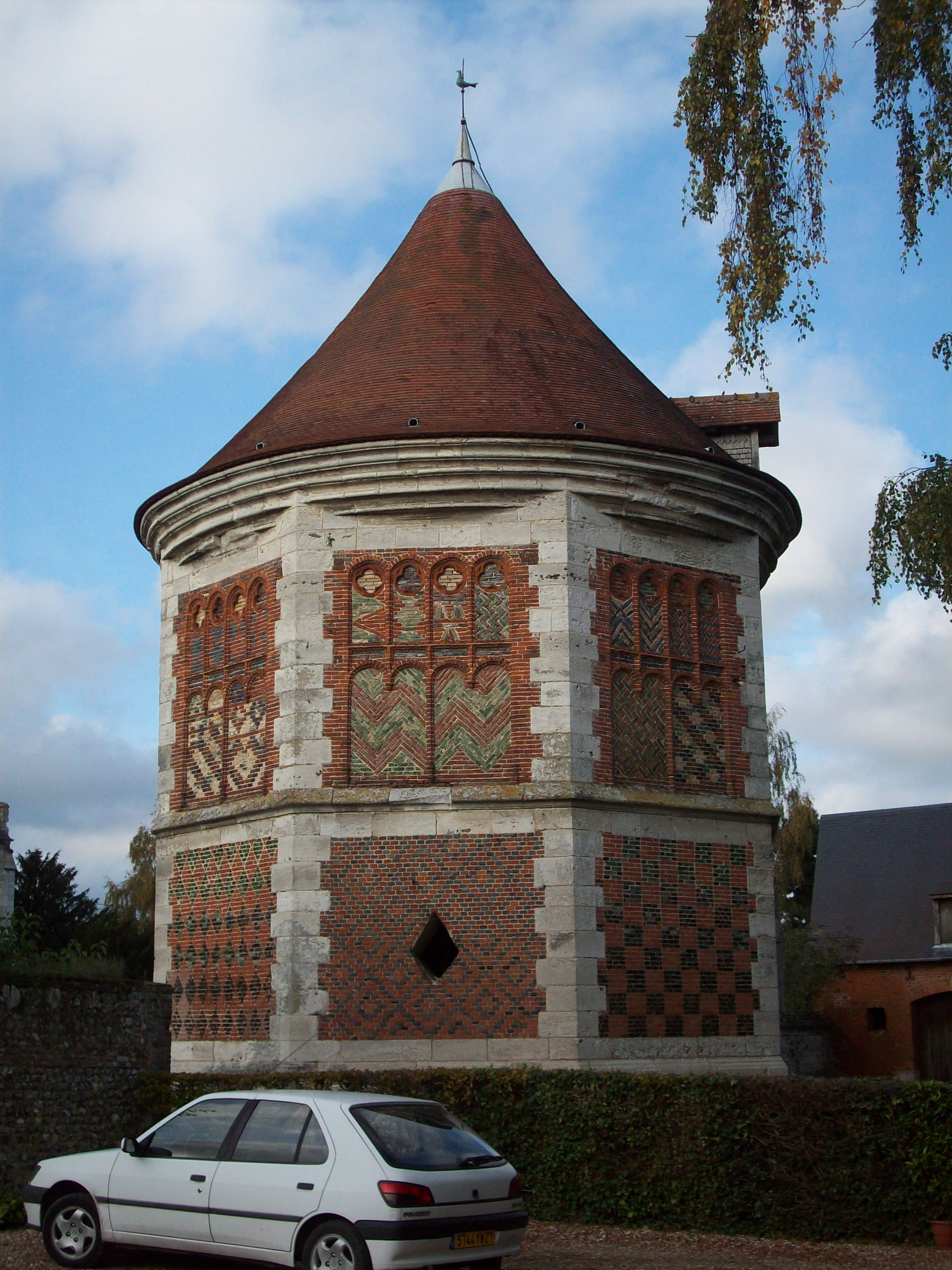 Colombier du manoir de l'abbaye de Saint-Amand, à Boos.